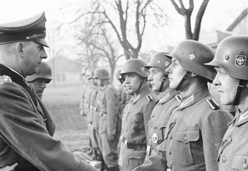 Kurt Daluege überreicht "Cholm-Schild" Scherl: SS-Oberst-Gruppenführer und Generaloberst der Polizei Daluege überreicht den Offizieren und Männern des Polizei-Bataillons "Cholm", die der Kampfgruppe Scherer angehörten, den vom Führer verliehenen Cholm-Schild. 7053-42 Abgebildete Personen: Daluege, Kurt Max Franz: Polizeigeneral, SS-Gruppenführer, 1946 in Prag hingerichtet, Deutschland